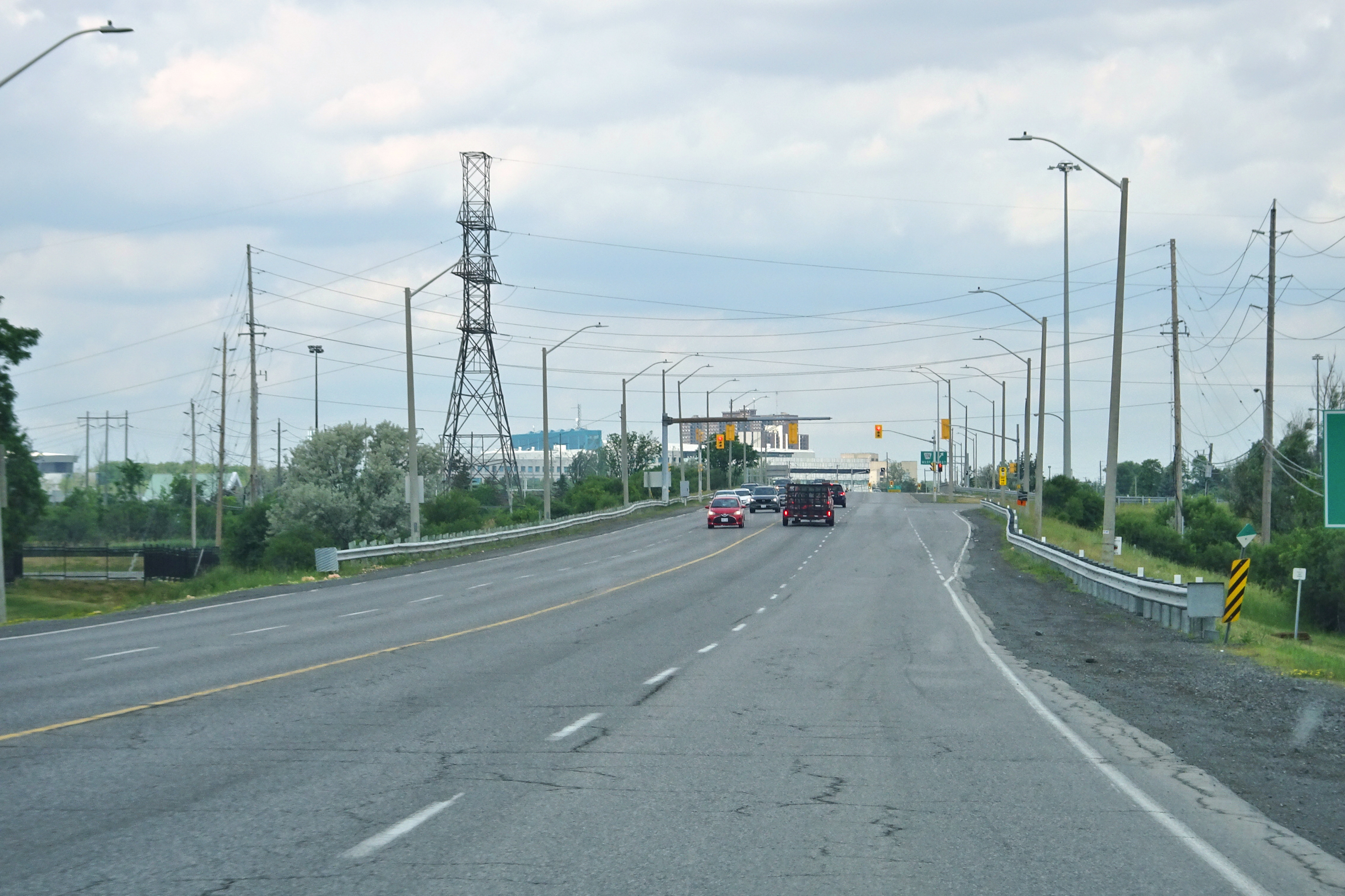 Blair Road, Ottawa, Ontario, Canada